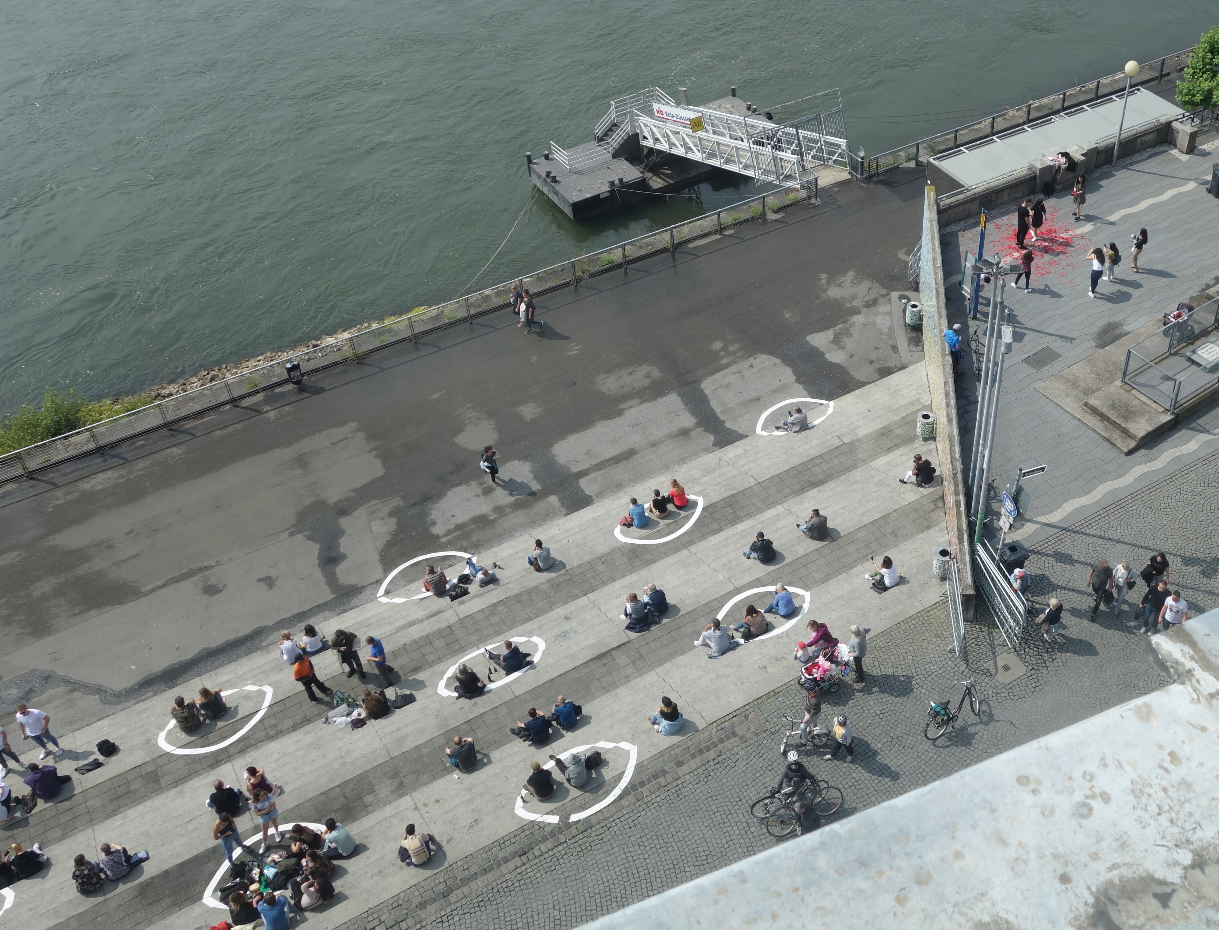 360 Kreise als symbolische Abstandsmarkierungen in der Corona-Krise, Düsseldorf Rheinufer, 11. Juni 2020. Die Stadt Düsseldorf will den Menschen in Erinnerung rufen, dass sie die Abstandsregeln zum Schutz vor der Ansteckung mit dem Coronavirus weiter einhalten müssen. ie Kreise haben einen Durchmesser von drei Meter und sind in einem Abstand von drei Metern voneinander platziert, damit ausreichend Platz ist, damit andere Menschen die bis zu zehnköpfigen Gruppen darin außen herum passieren können. Die Kosten für die Markierung der Abstands-Kreise betragen rund 7000 Euro. (Quelle: Rheinische Post)